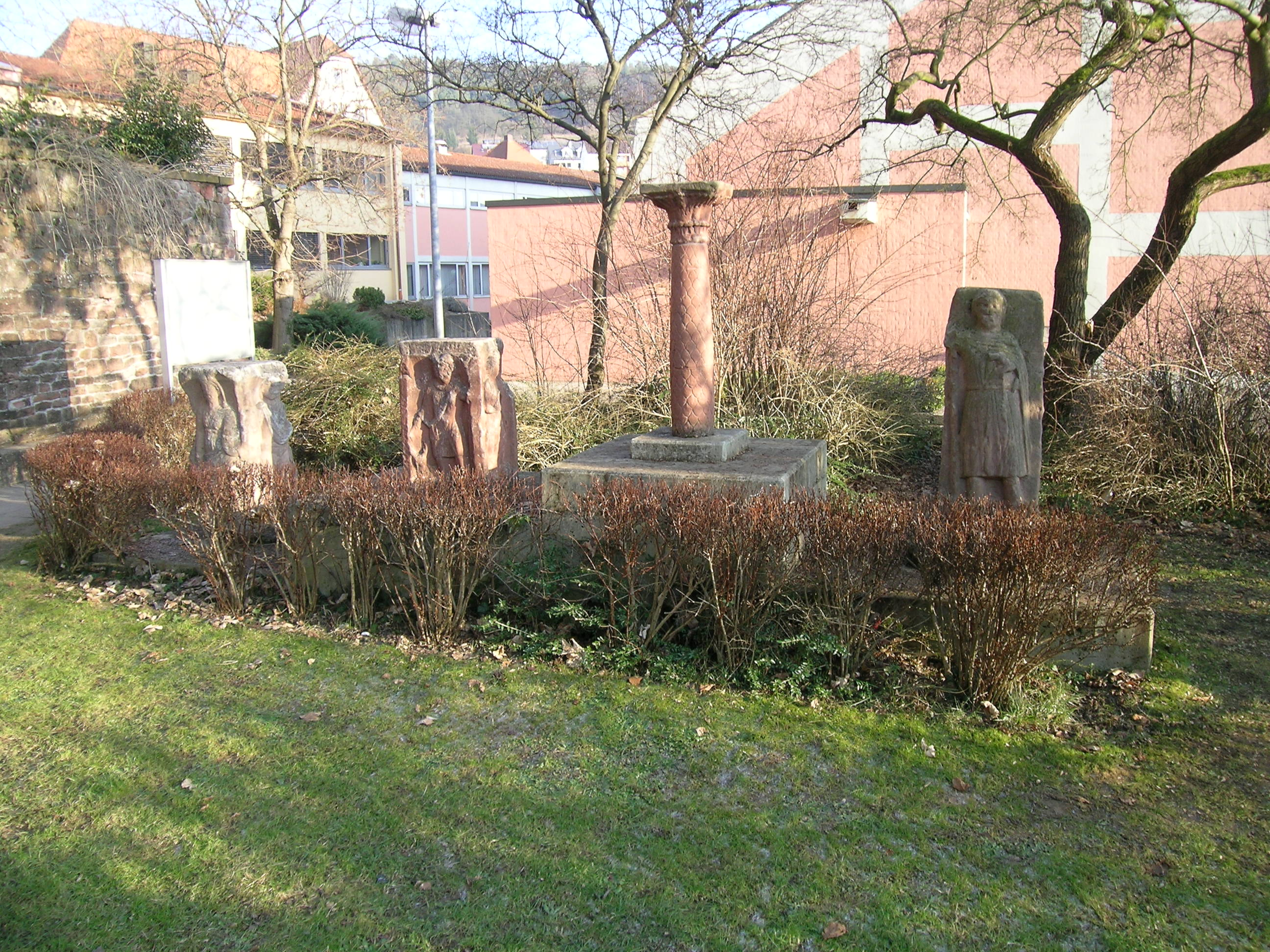 Römische Göttersteine unterhalb der Pfarrkirche St. Martin in Mömlingen (Bayern)